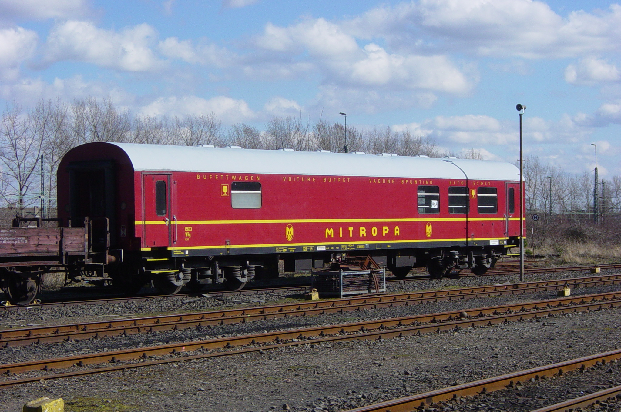 Mitropa-Speisewagen 50 50 87-15 602-0